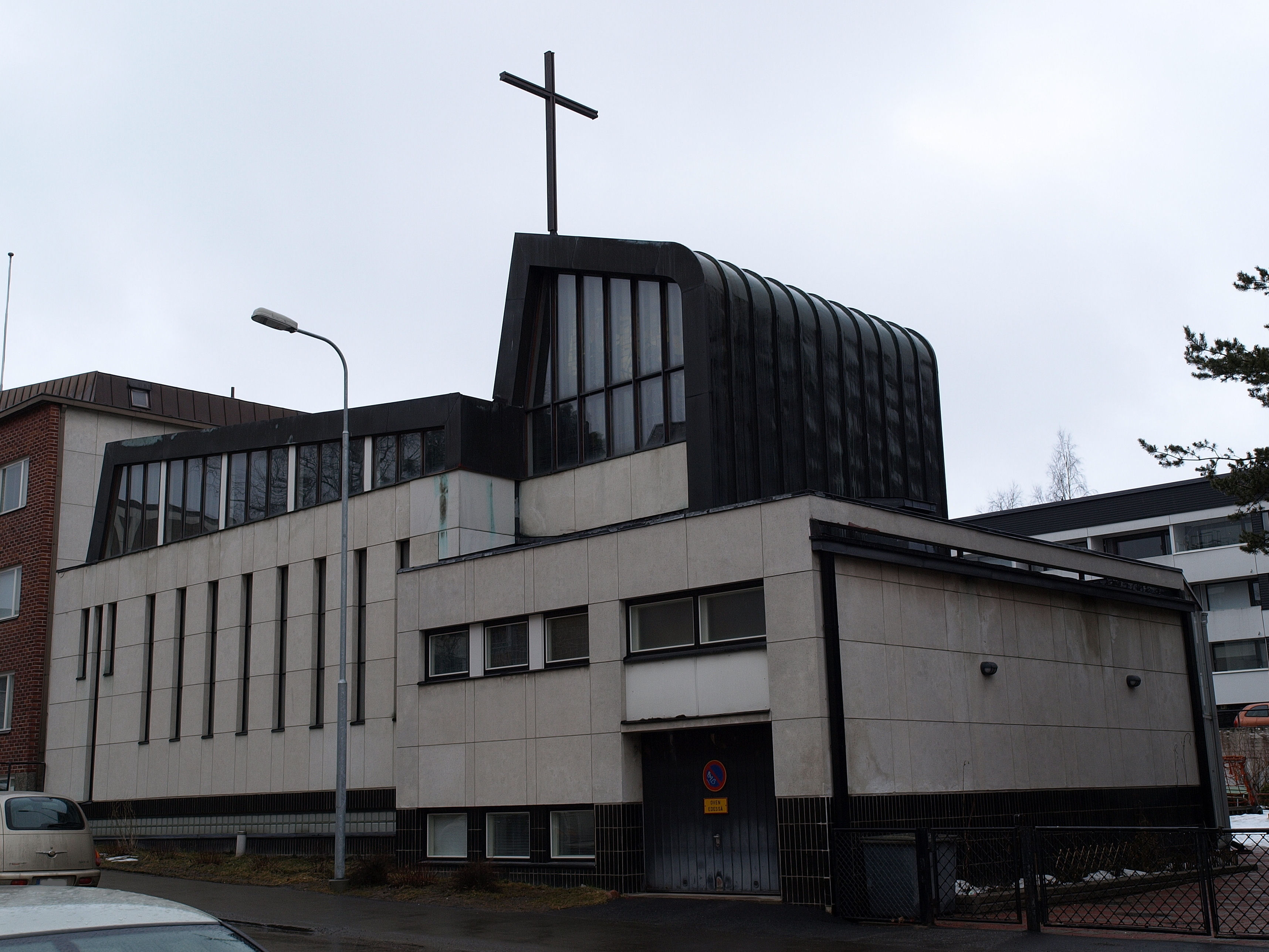 Pyhän Olavin kirkko Jyväskylässä, kuvattu alamäestä